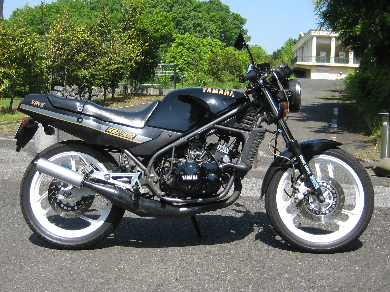 ヤマハRZ250R(1XG) '1987年モデル。 Yamaha RZ250R(1XG) 1987 Japan